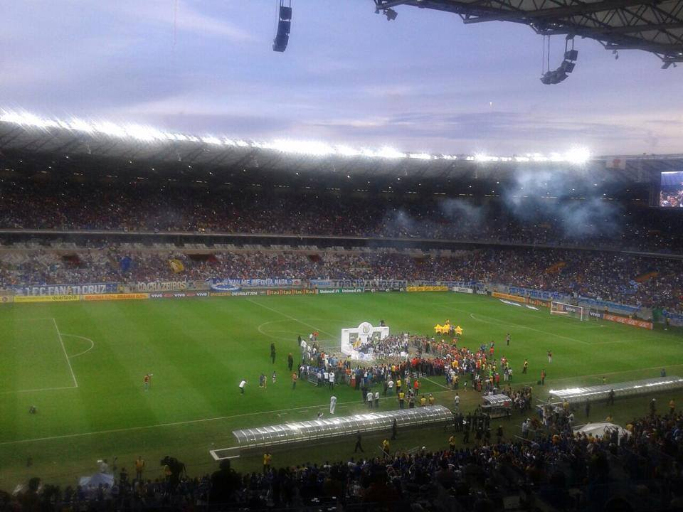 Cruzeiro Tetra Campeão Brasileiro